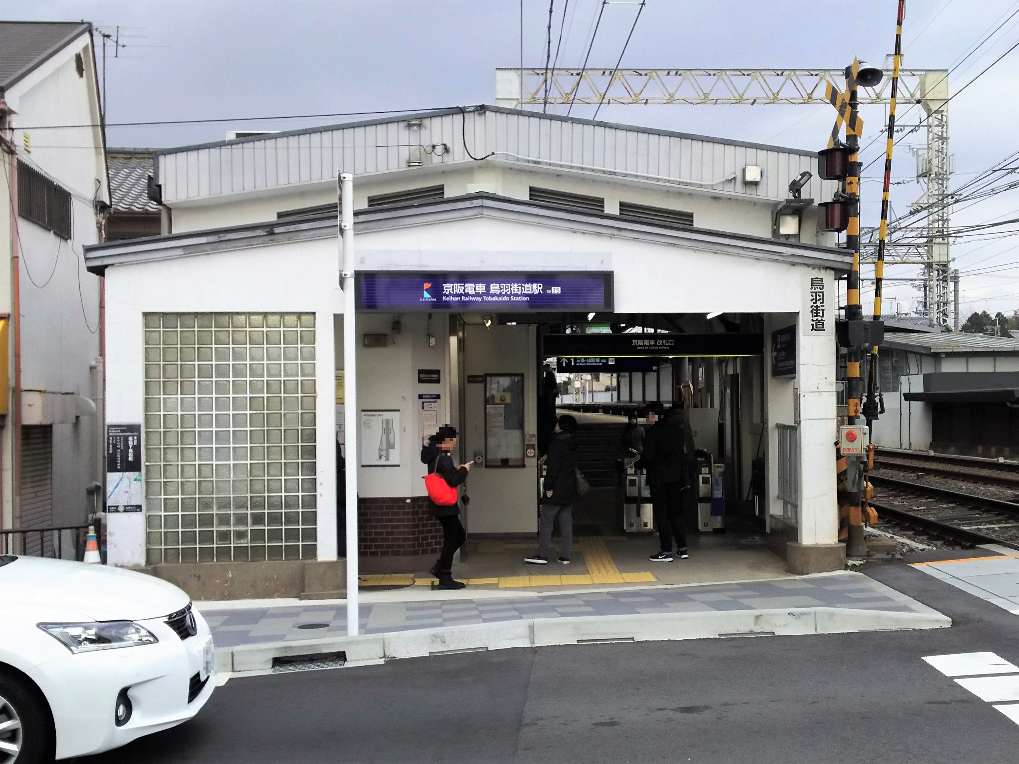 京阪本線鳥羽街道駅駅舎（京都市東山区）